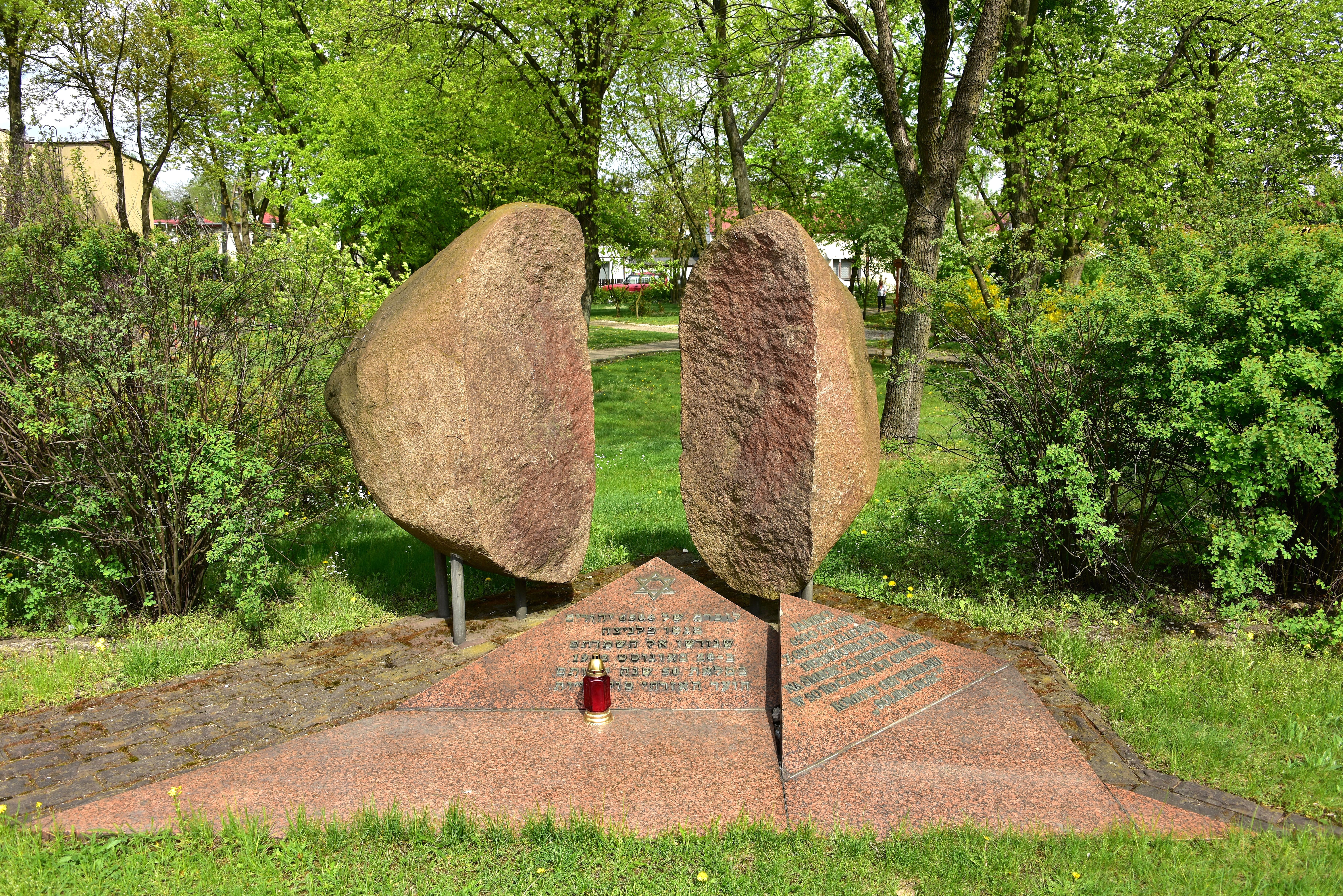 Upamietnienie ofiar getta w Falenicy ul. Patriotów w Warszawie